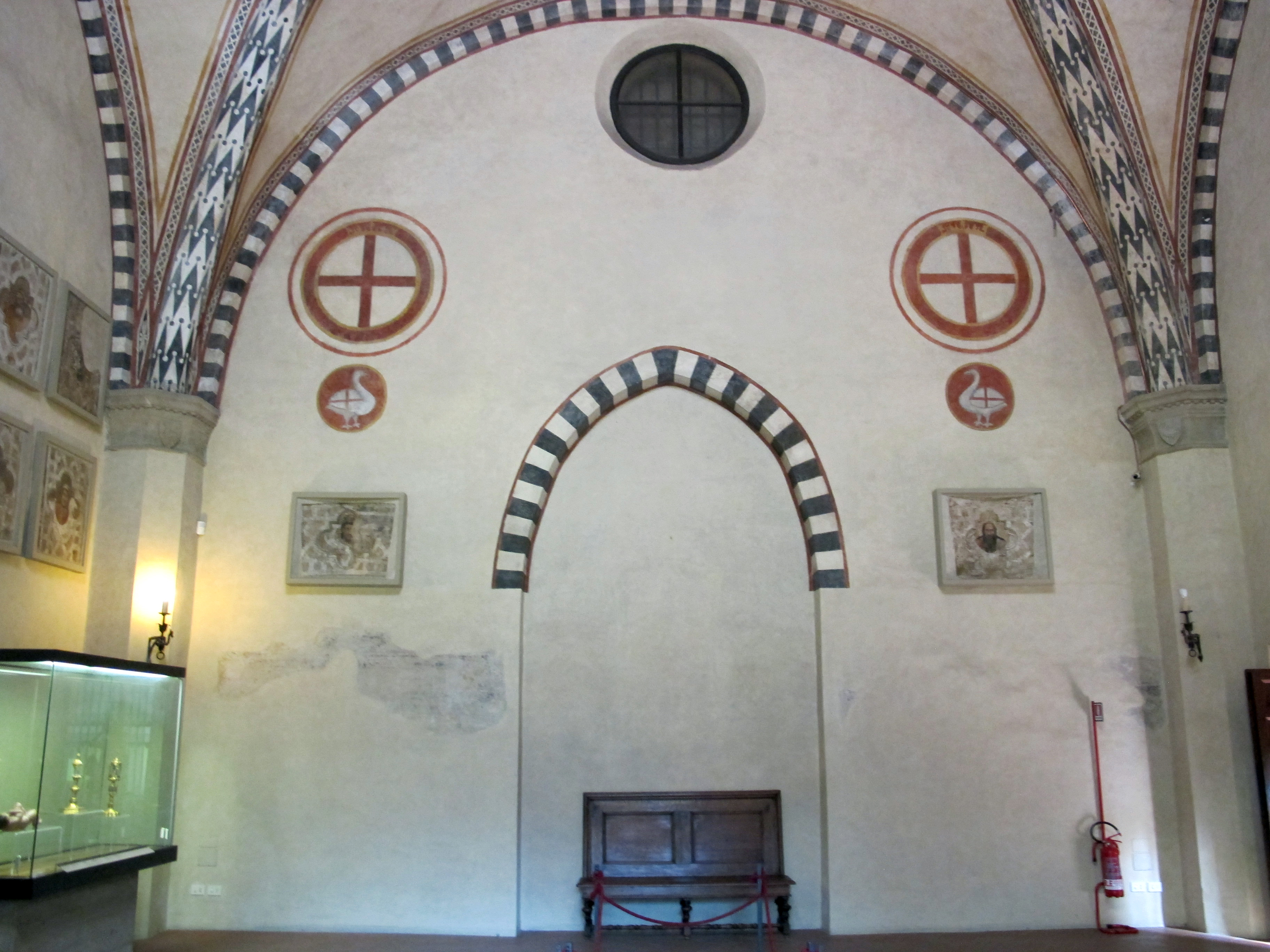 Cappella Ubriachi, Firenze